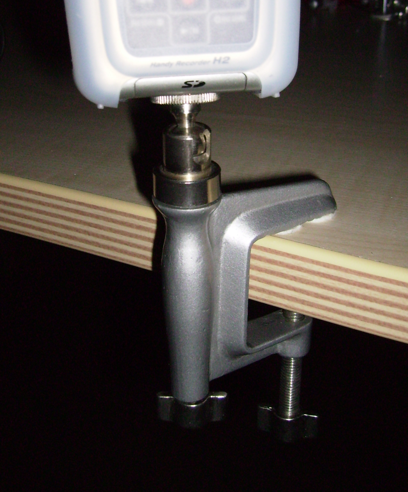 ein Klemmstativ für Kameras und Rekorder